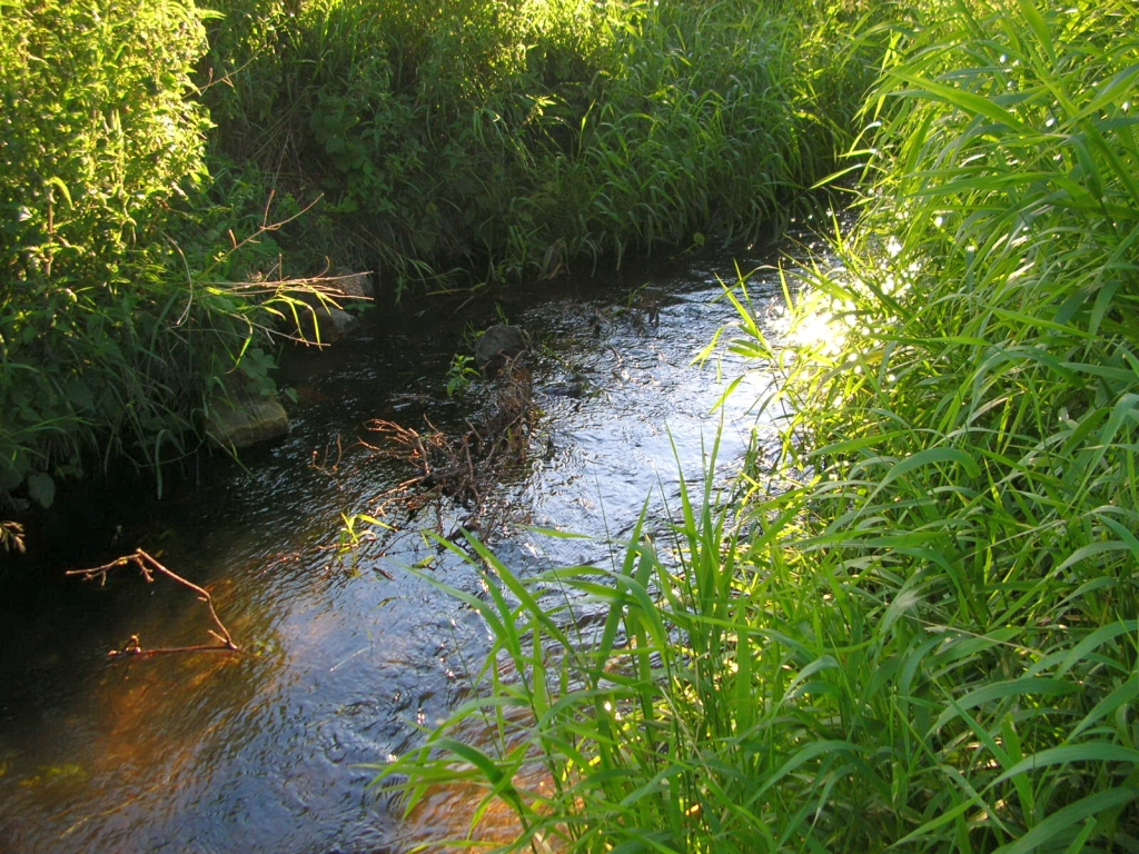 Potok Flis w Bydgoszczy, w pobliżu Kanału Bydgoskiego